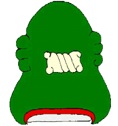 Glifo de Tlahuiltepa, Hidalgo